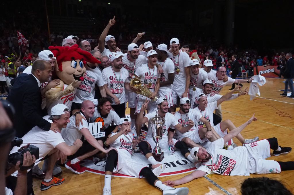 Festeggiamenti Alma Pallacanstro Trieste